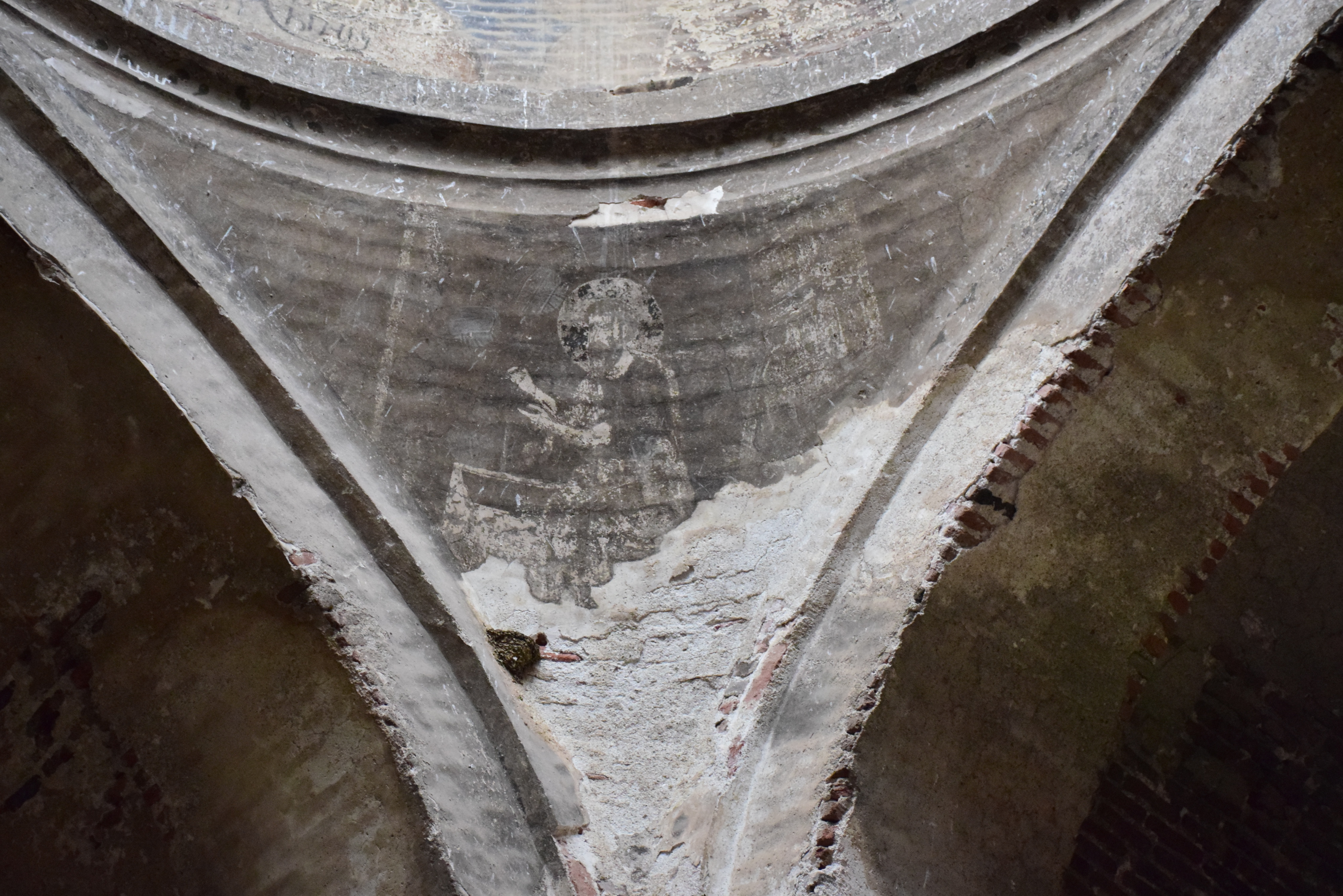 Վանական համալիր «Կիրանց» 39/11